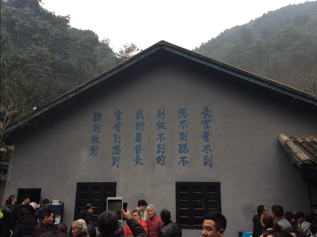 中文（中国大陆）: 渣滓洞监狱墙壁上书写的标语